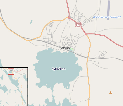 Bild över Kyrkviken, Arvika.